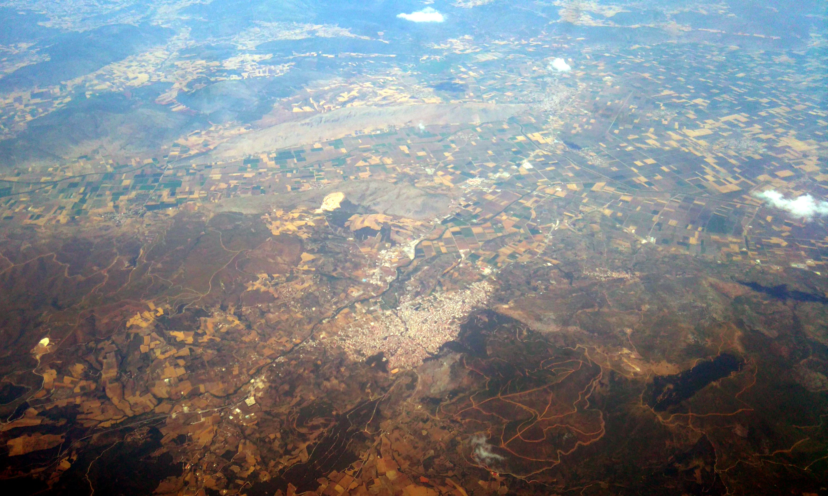 Αεροφωτογραφία Λειβαδιάς